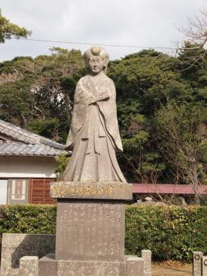 中山爱子